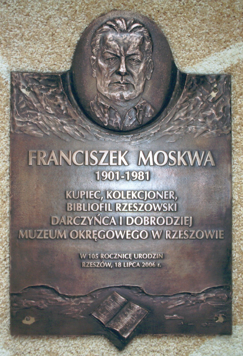 Tablica pamiątkowa Franciszka Moskwy w Muzeum Okręgowym w Rzeszowie